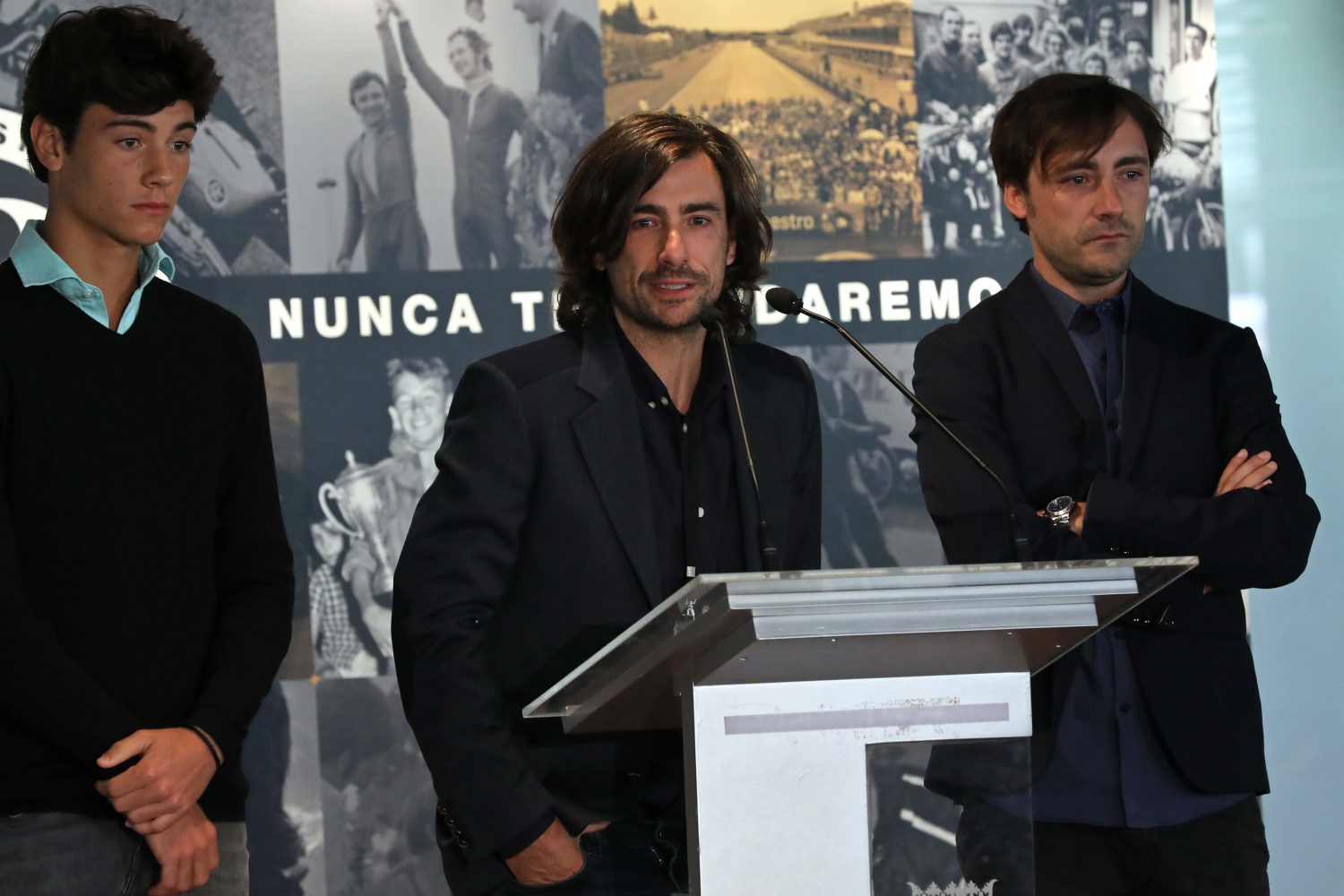 Instituciones y personalidades se han sumado esta mañana a familiares y amigos para rendir un sentido homenaje a Ángel Nieto, campeón mundial de motociclismo e hijo adoptivo de Madrid en un acto organizado por su familia con la colaboración del Ayuntamiento de Madrid y el Consejo Superior Deportes. Desde el Pabellón de los Jardines de Cecilio Rodríguez, del Parque de El Retiro, la alcaldesa de Madrid, Manuela Carmena ha destacado la personalidad “excepcional” del campeón “12+1”, “su pasión y su bondad”. La ciudad de Madrid, “donde pasó su infancia y se fraguó su pasión, necesita muchas personas como él y no le olvidará nunca”, manifestó la alcaldesa, en unas palabras que también repasaron otros aspectos de “quien fue capaz de poner a España en un lugar impensable del motociclismo internacional”.